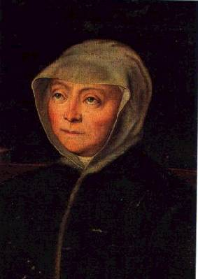 Ludovica Torelli, contessa di Guastalla